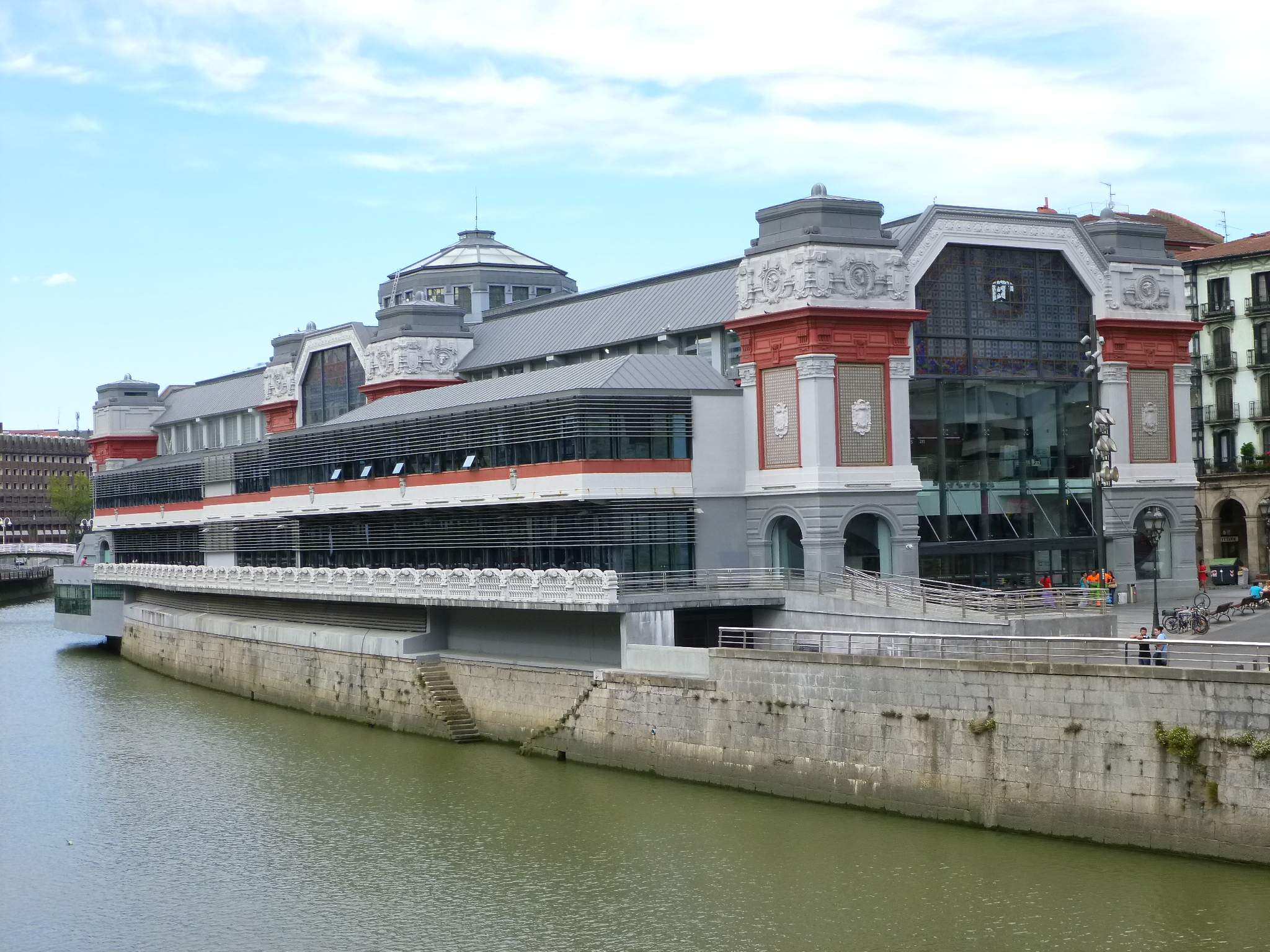 Mercado de la Ribera (Bilbao)